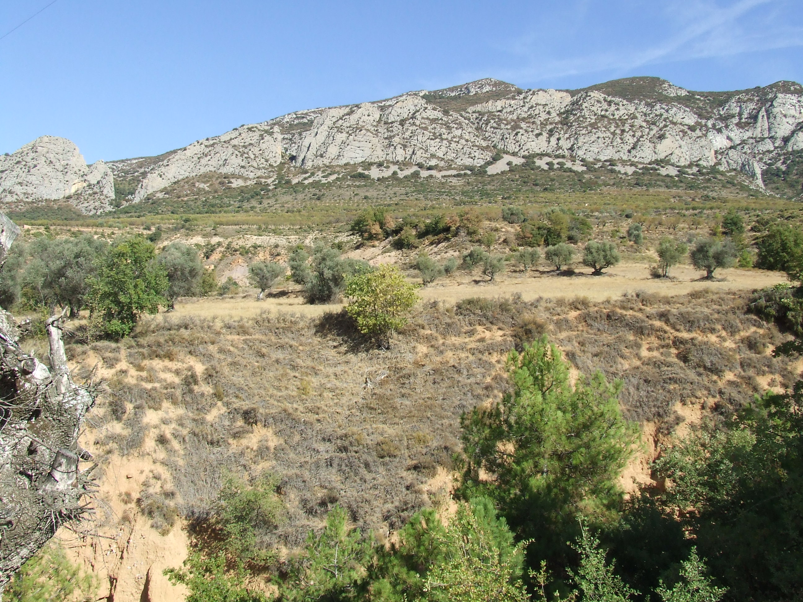 Caridella (Abella de la Conca, Pallars Jussà)